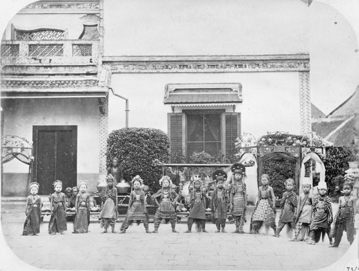 Foto. Kinderen in danskostuums , Kebun Dalem, Semarang